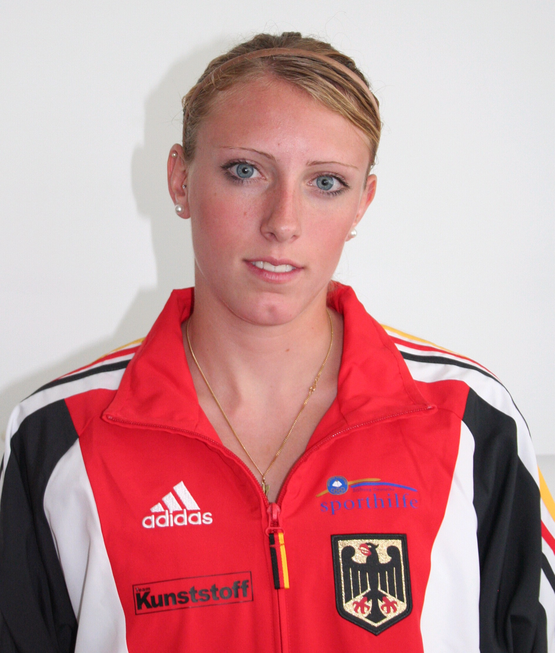 Junioren Europameisterin im Vierer-Kajak 2008 (Kanu-Rennsport)